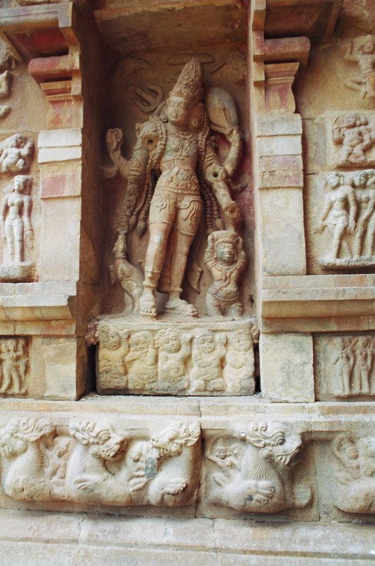 Sculpture at Gangaikonda Cholapuram